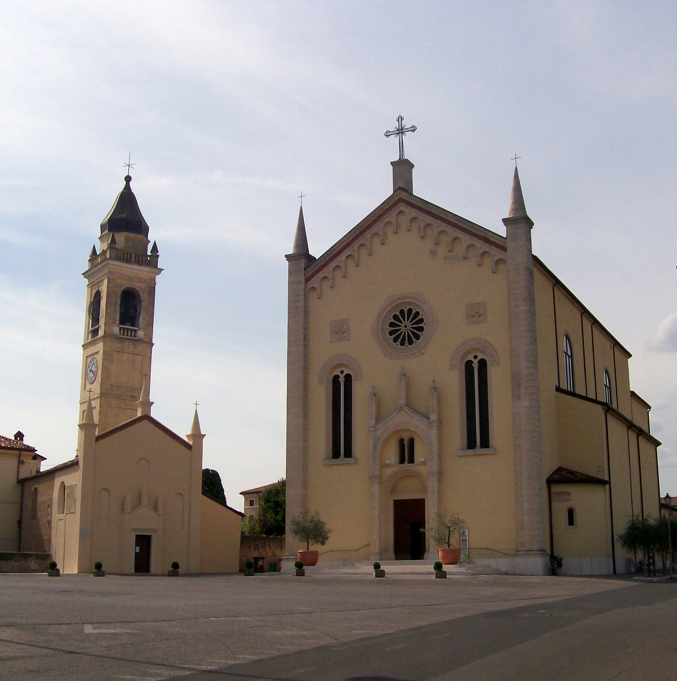 A destra l'Abbazia di San Zeno e il campanile, a sinistra la chiesa parrocchiale, sempre dedicata a San Zeno Vescovo, in Cellore d'Illasi (VR).